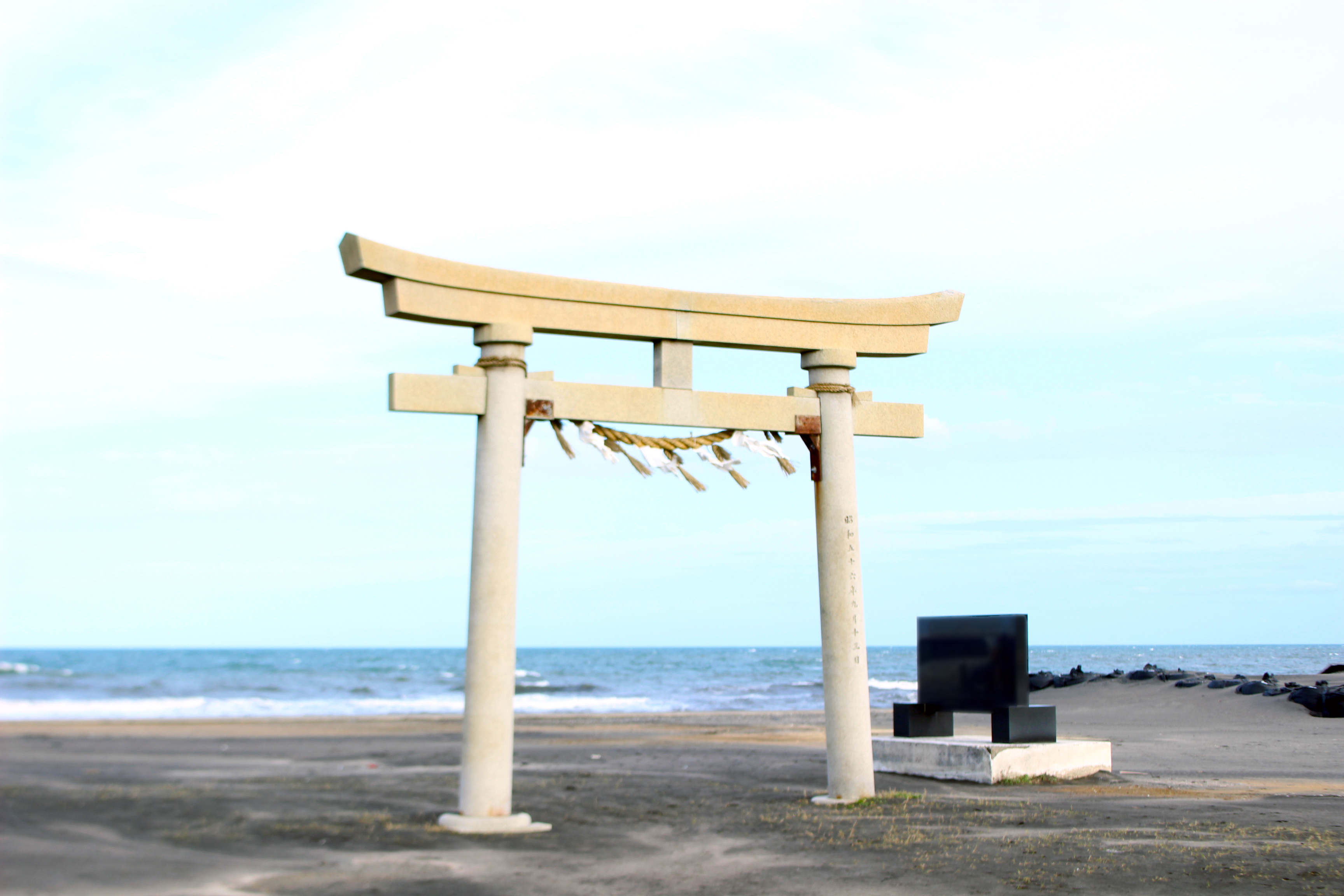 Tsurigasaki Surfing Beach